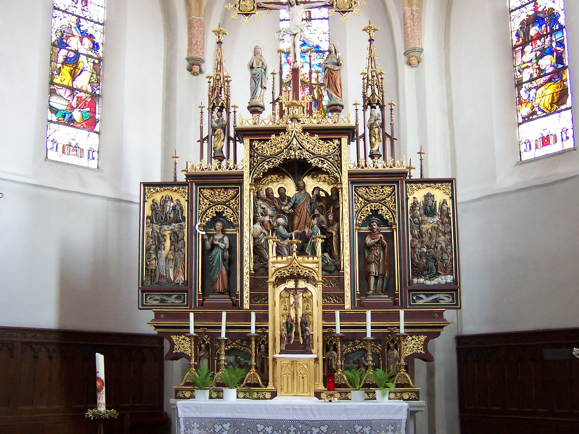 Essenbach, Altheim, Dorfstraße 80. Katholische Kirche St. Peter. Saalkirche, spätgotische Anlage um 1456, Langhausmauern und Turm im Kern noch spätromanisch. Neugotischer Hochaltar.